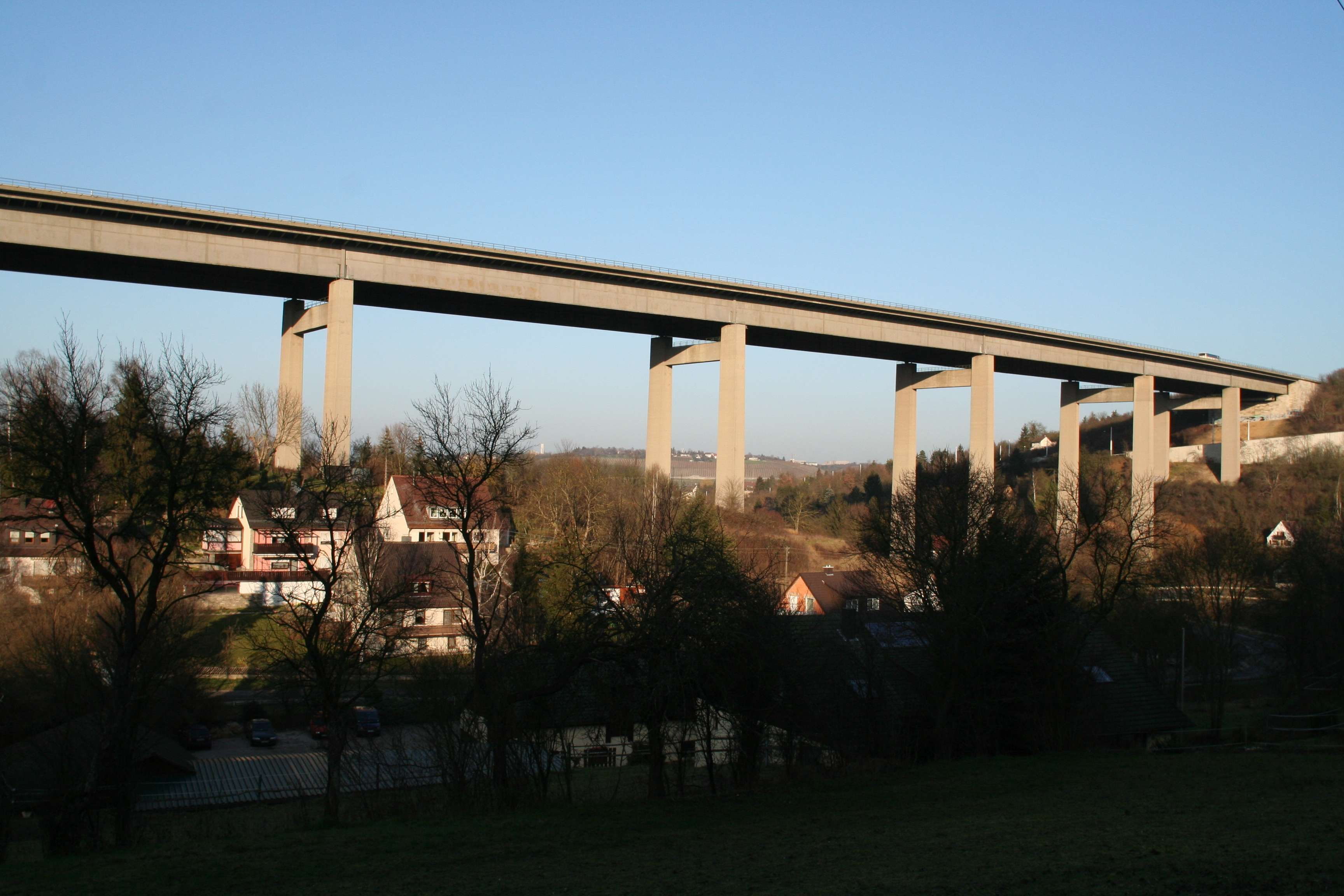 Talbrücke Heidingsfeld der Autobahn A3 bei Würzburg